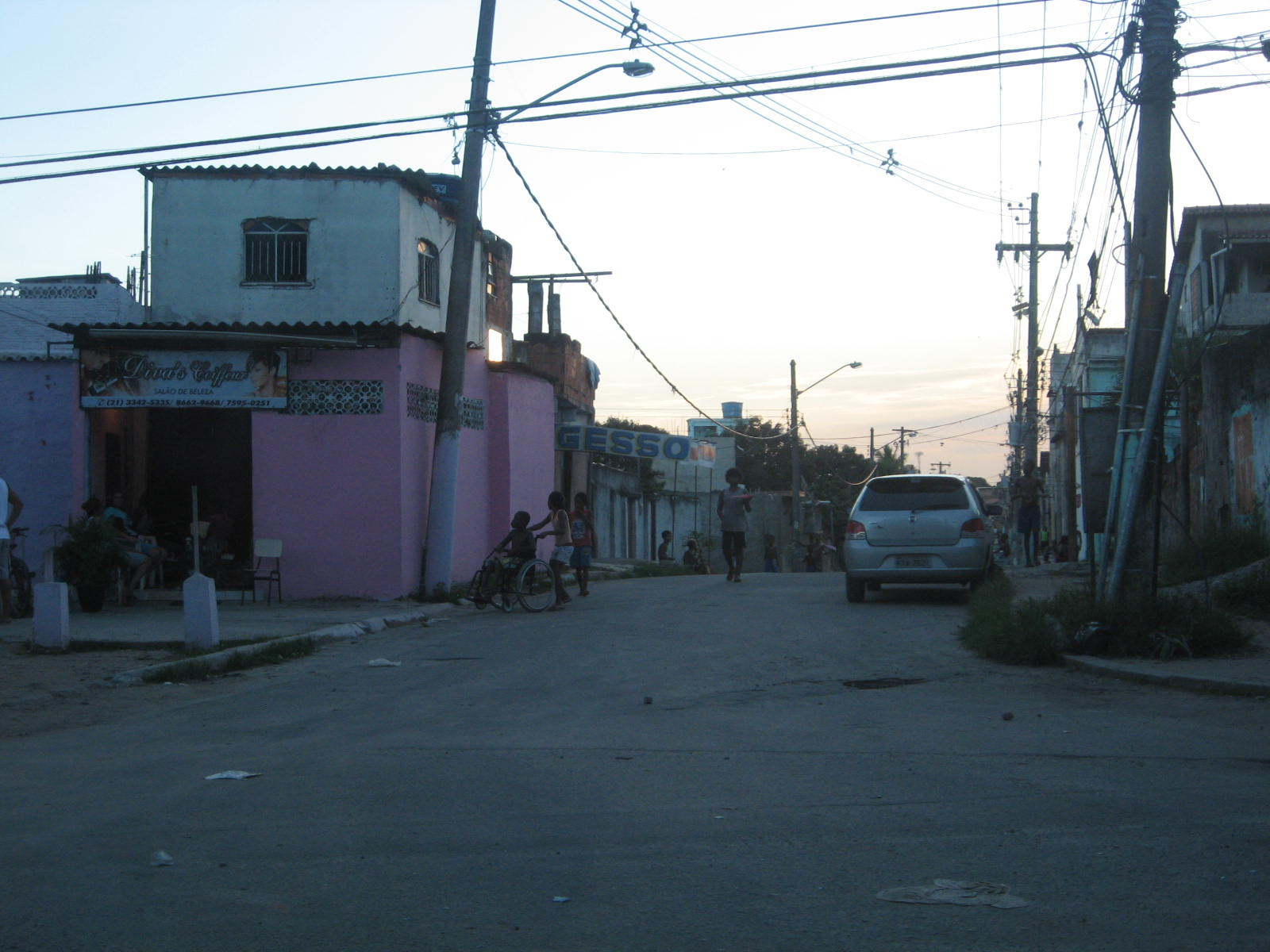 Vista da Cidade de Deus.